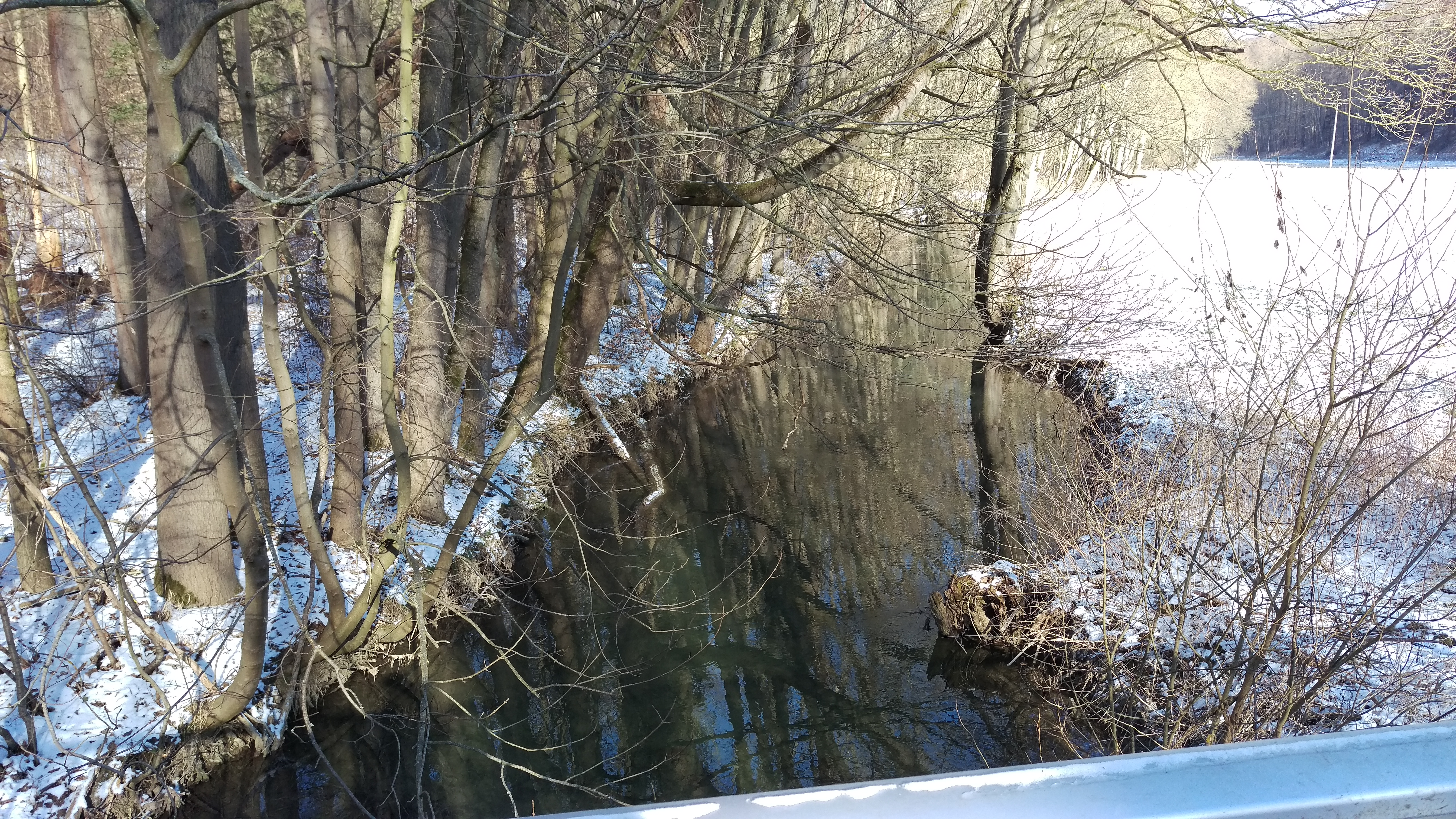 Die Helbe zwischen Dietenborn und Toba im thüringischen Kyffhäuserkreis.